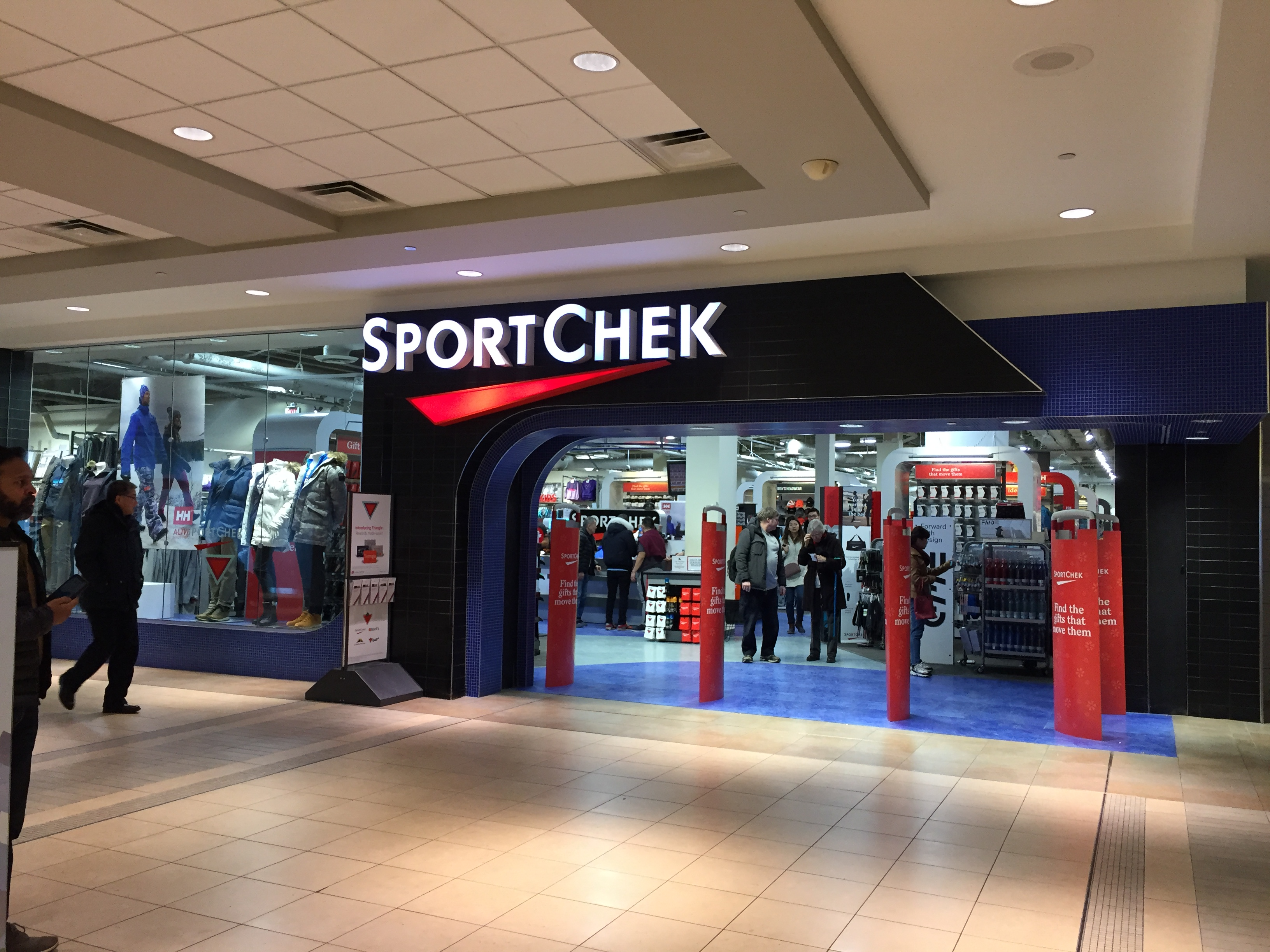 کوردی: سپۆرت چێک لە تۆرەنتۆ